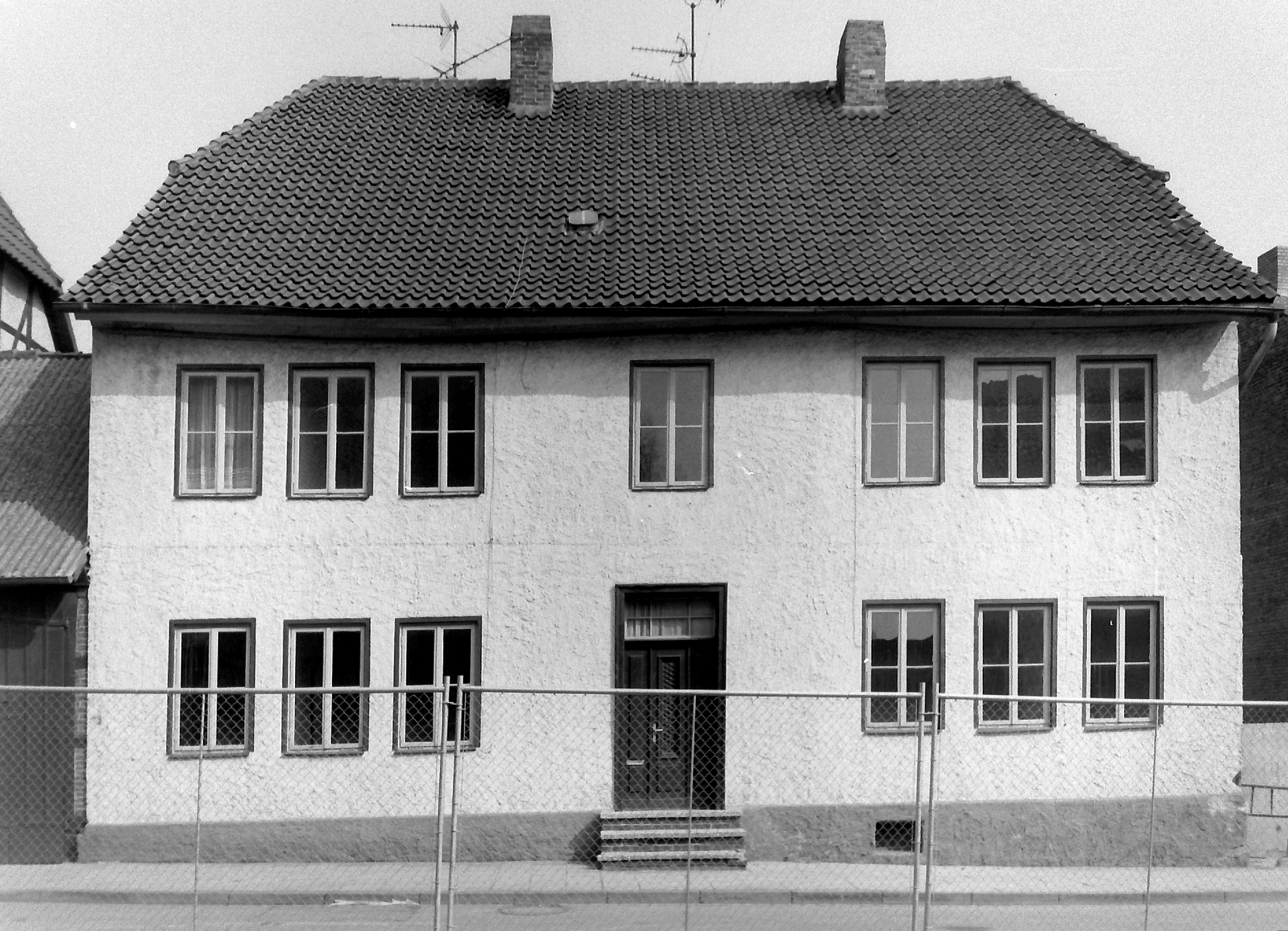 Vorsfelde, Amtsstrasse 6, Abriss 1987, Schule bis 1870